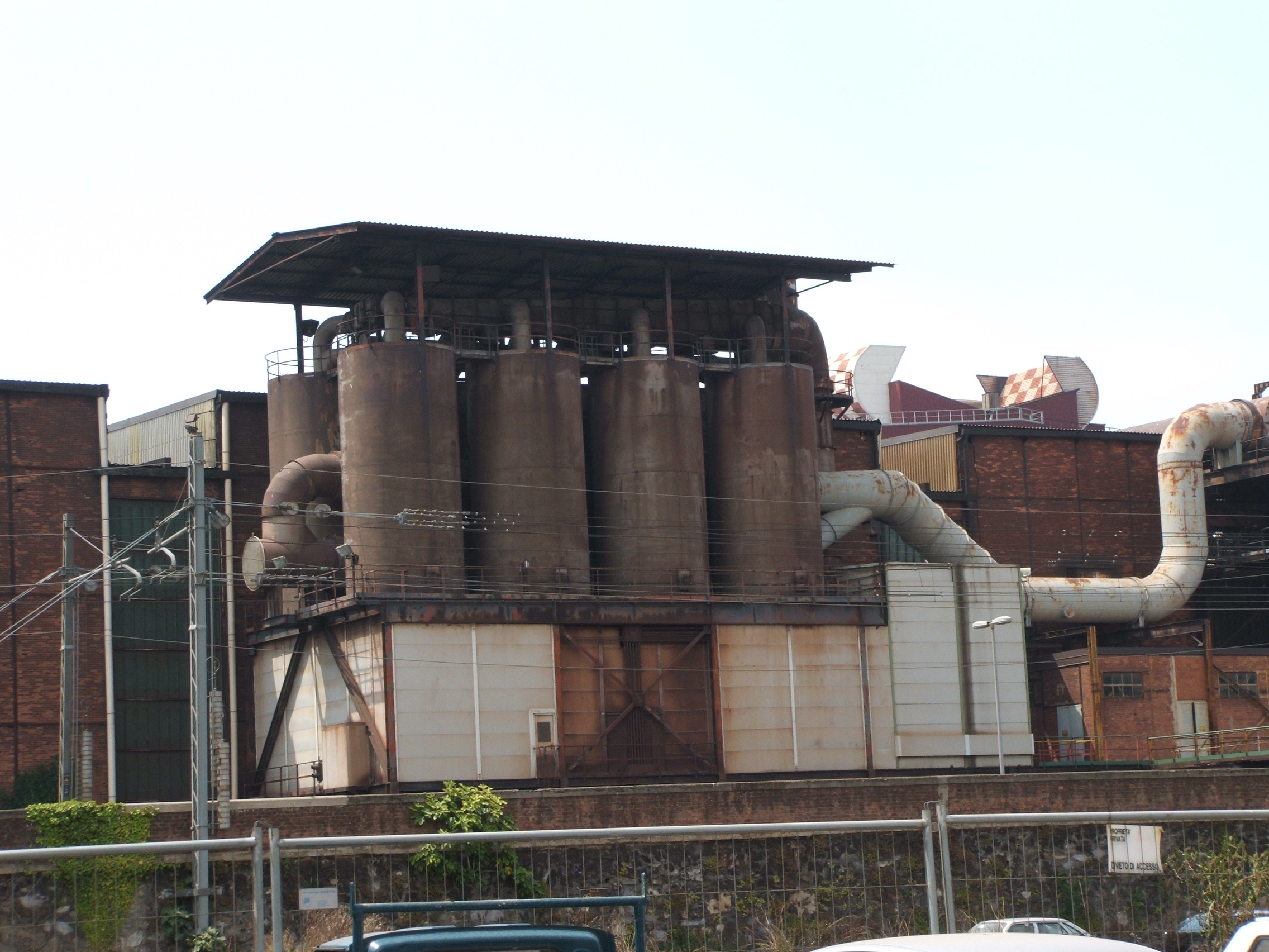 Genova Impianti industriali Italsider